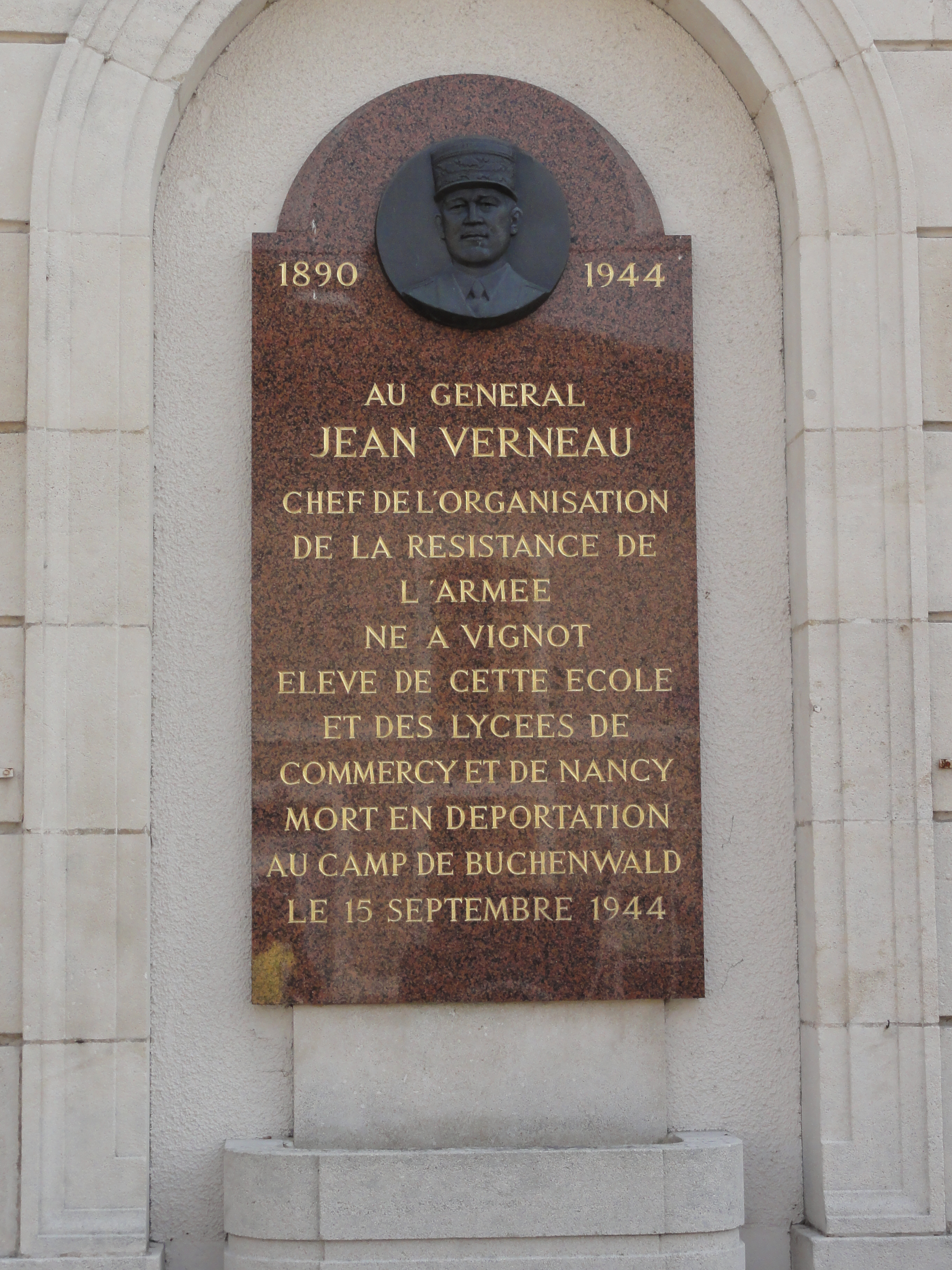 Vignot (Meuse) memorial Jean Verneau déporté Buchenwald 1944